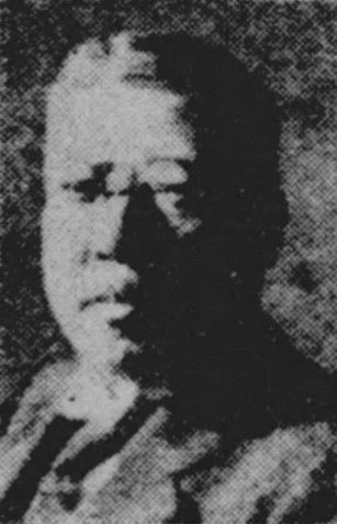 関口志行（1882-1958）